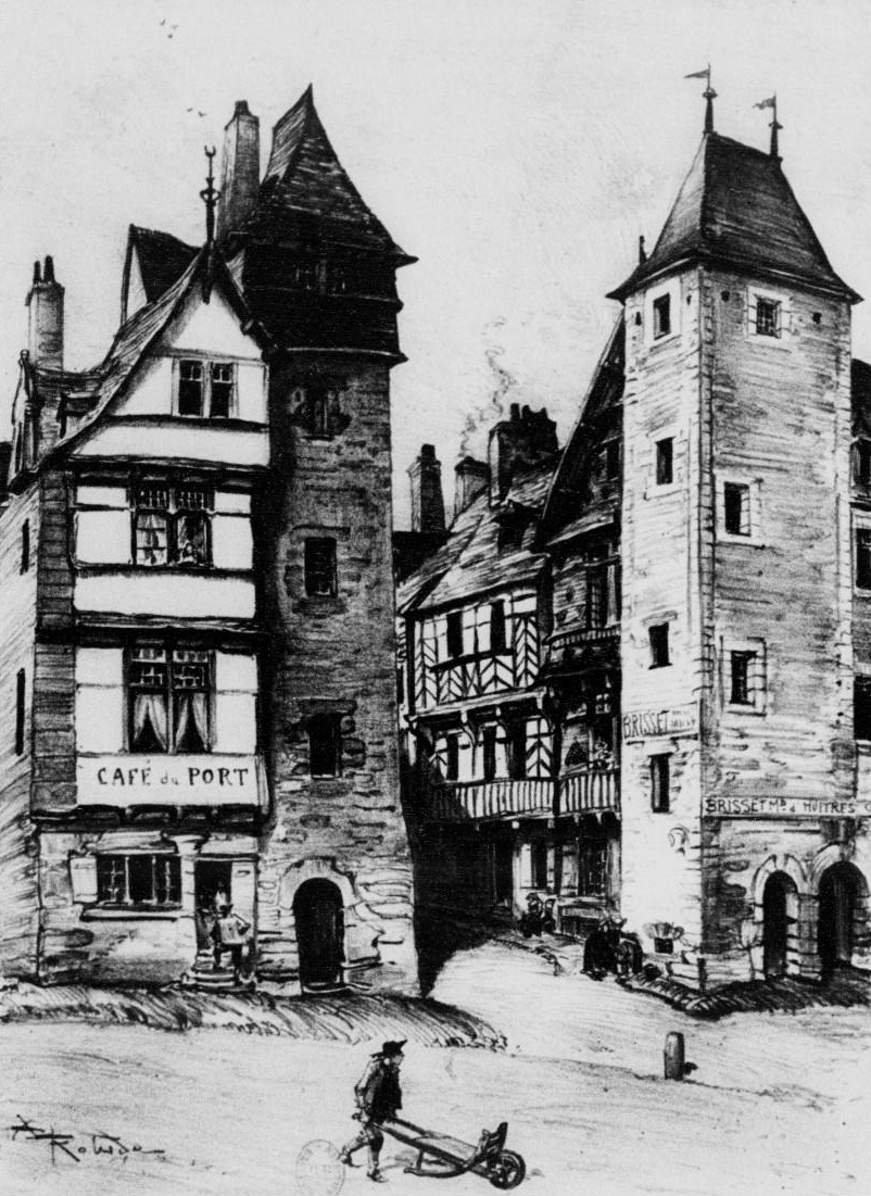 L'entrée de Tréguier (depuis le port) vers 1900 (lithographie d'Albert Robida publiée dans "La vieille France, Bretagne" vers 1900)